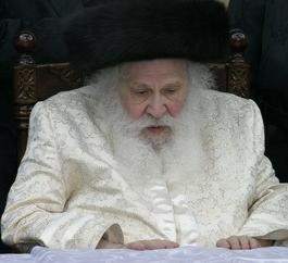 רבי אברהם חיים ראטה משומרי אמונים